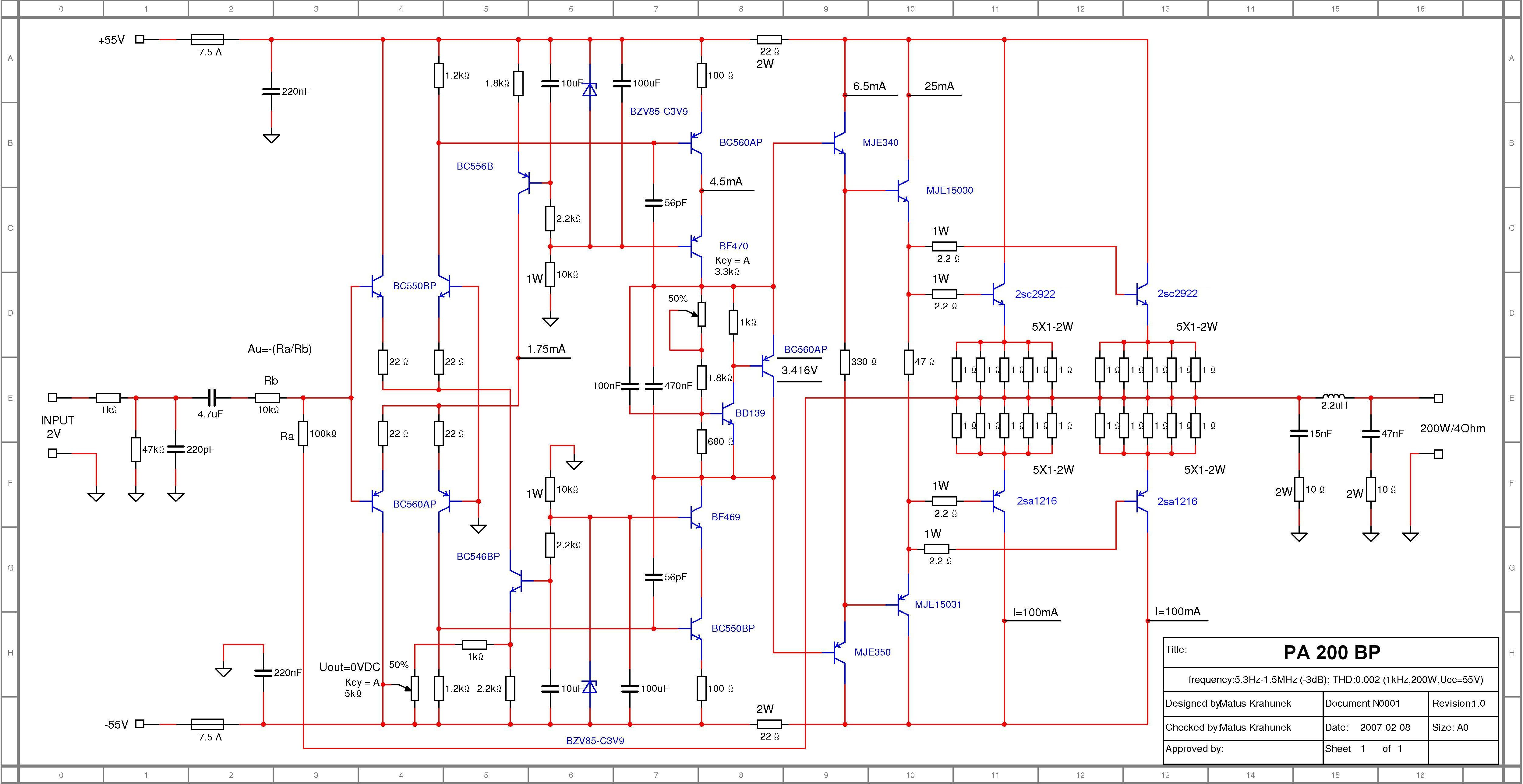 Skutočné zapojenie NF výkonového zosilňonača 200W/4Ohm.